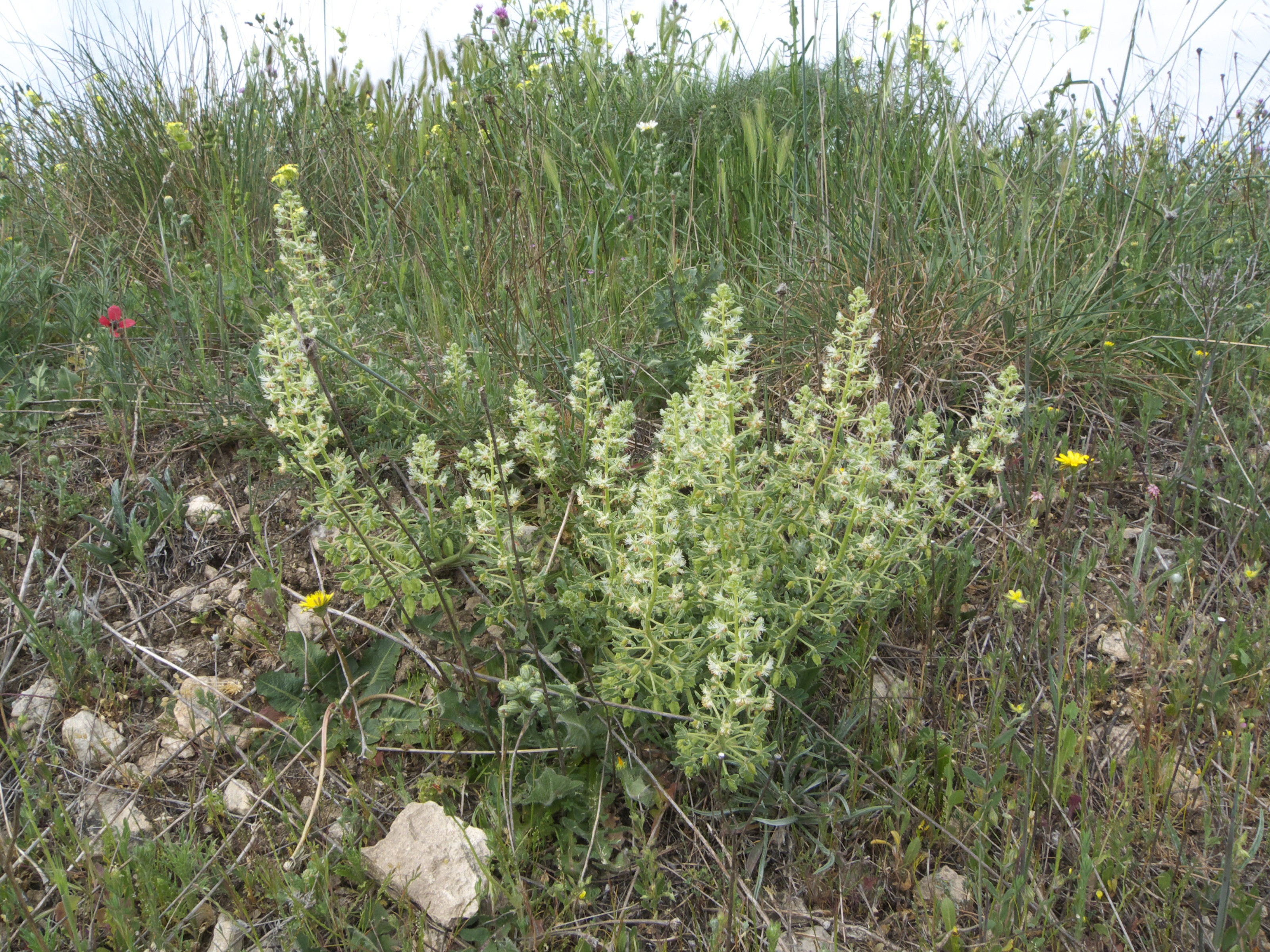 Reseda phyteuma (Resedaceae, Brassicales). Rivas Vaciamadrid, Madrid.